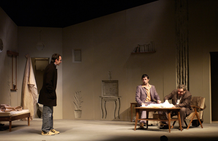 Damjan Kecojević, Vojin Ćetković I Josif Tatić